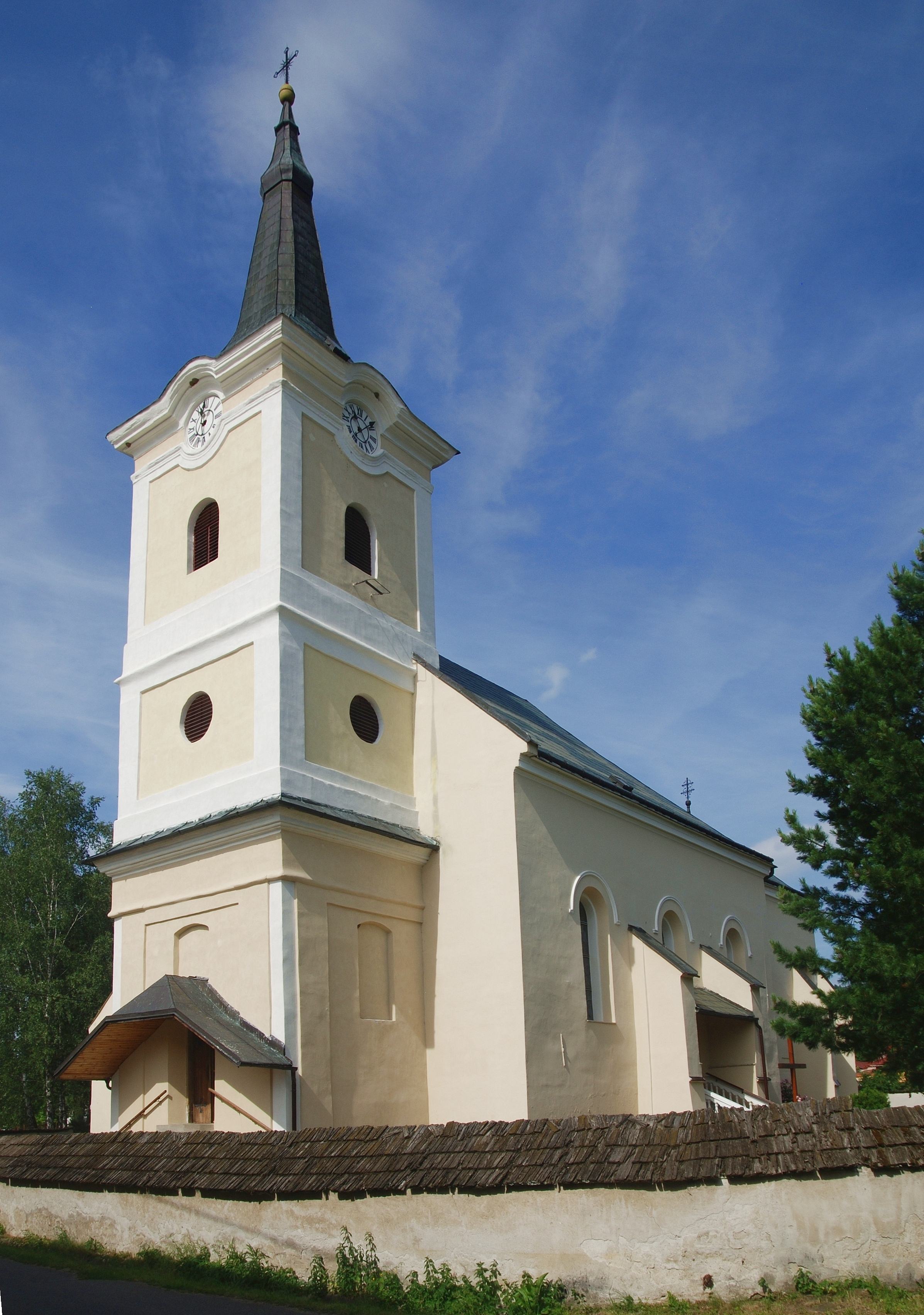 wieś Tvarožná (okres Kežmarok)